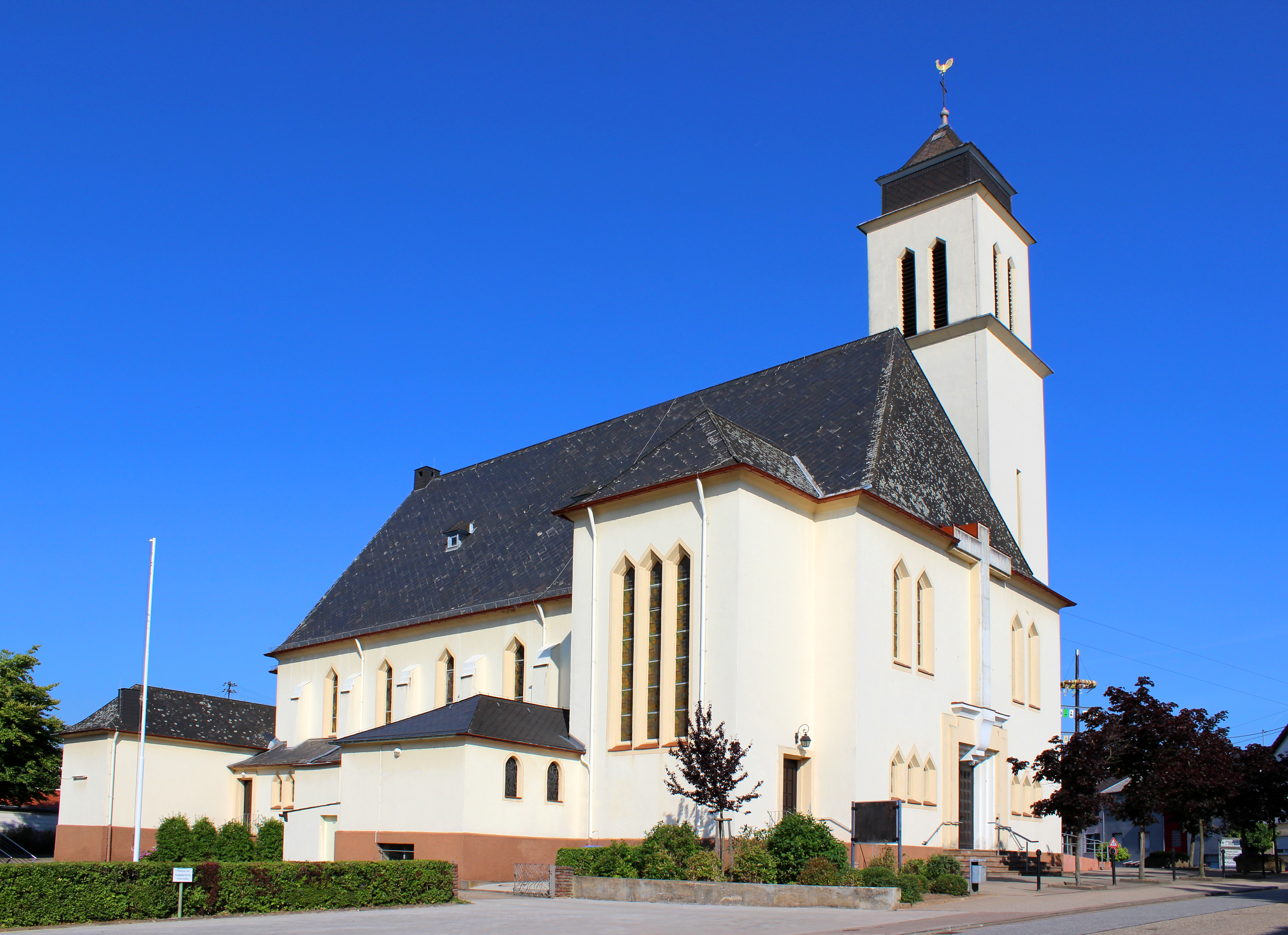 Die katholische Pfarrkirche St. Bonifatius in Püttlingen, Regionalverband Saarbrücken, Saarland